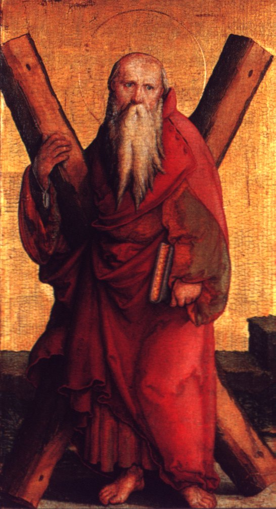 Falkensteiner Retabel rechter Drehflügel, innen, Hl. Andreas Eingescannt aus: Anna Moraht-Fromm und Hans Westhoff: Der Meister von Meßkirch – Forschungen zur südwestdeutschen Malerei des 16. Jahrhunderts, Ulm, 1997, S. 64, unten rechts